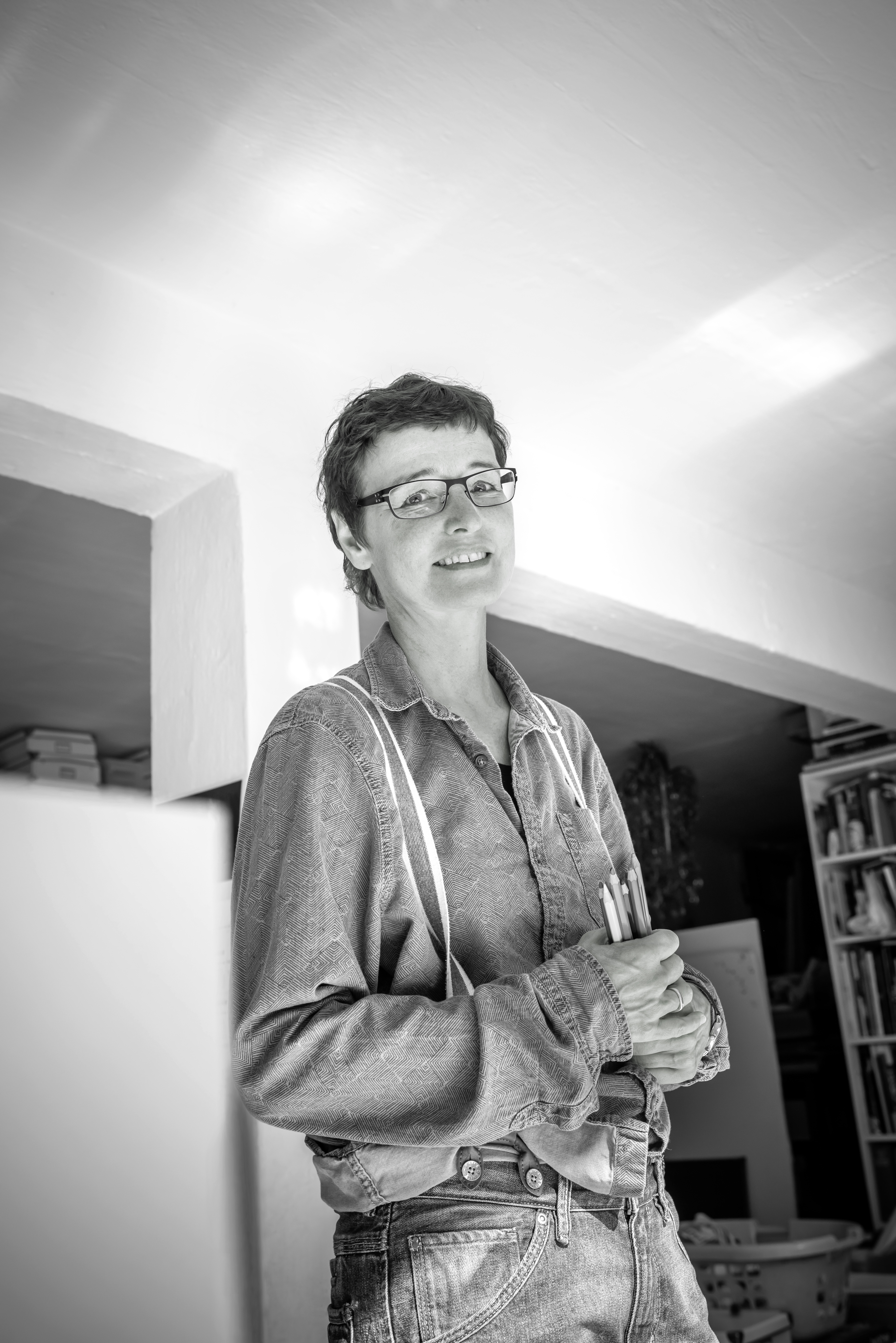 Portrait der Lichtkünstlerin Claudia Wissmann in ihrem Atelier in Hannover; Fotograf: Heiko Preller